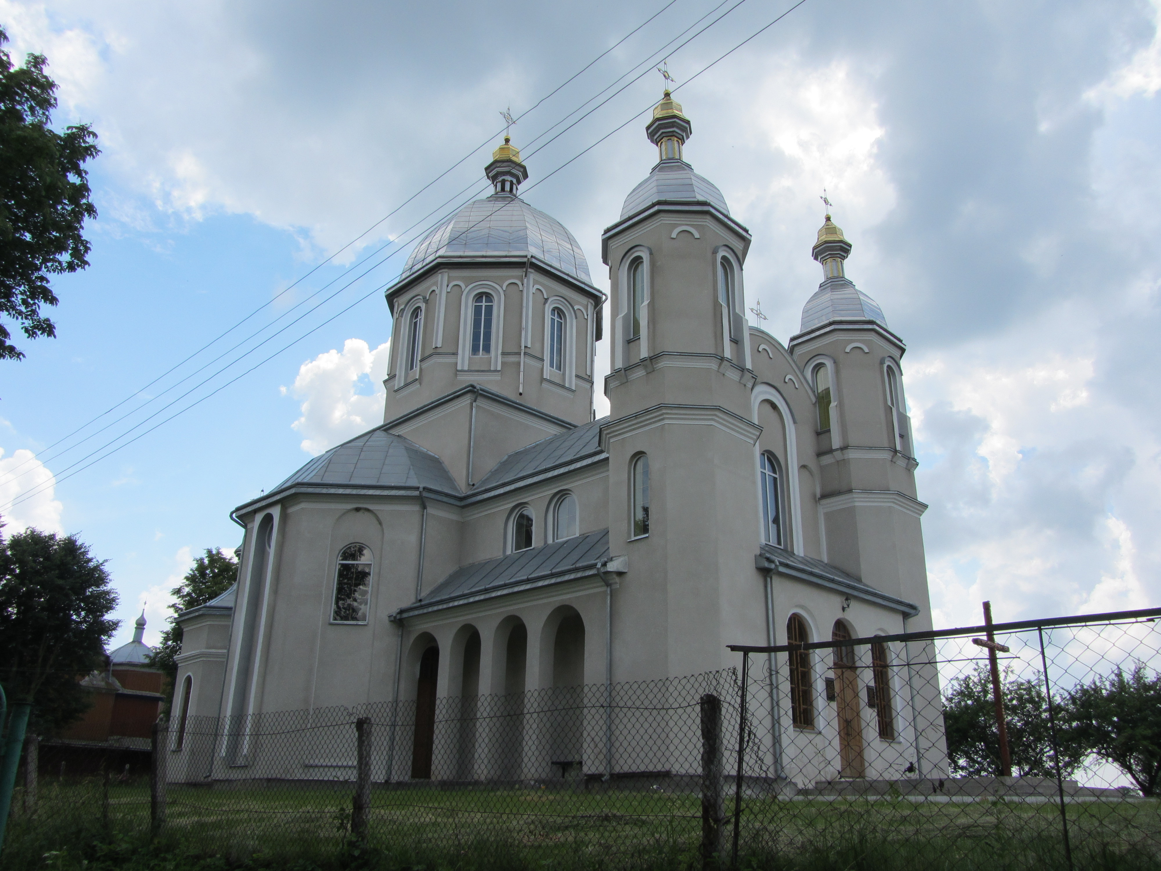 Храм Петра і Павла у селі Грімне